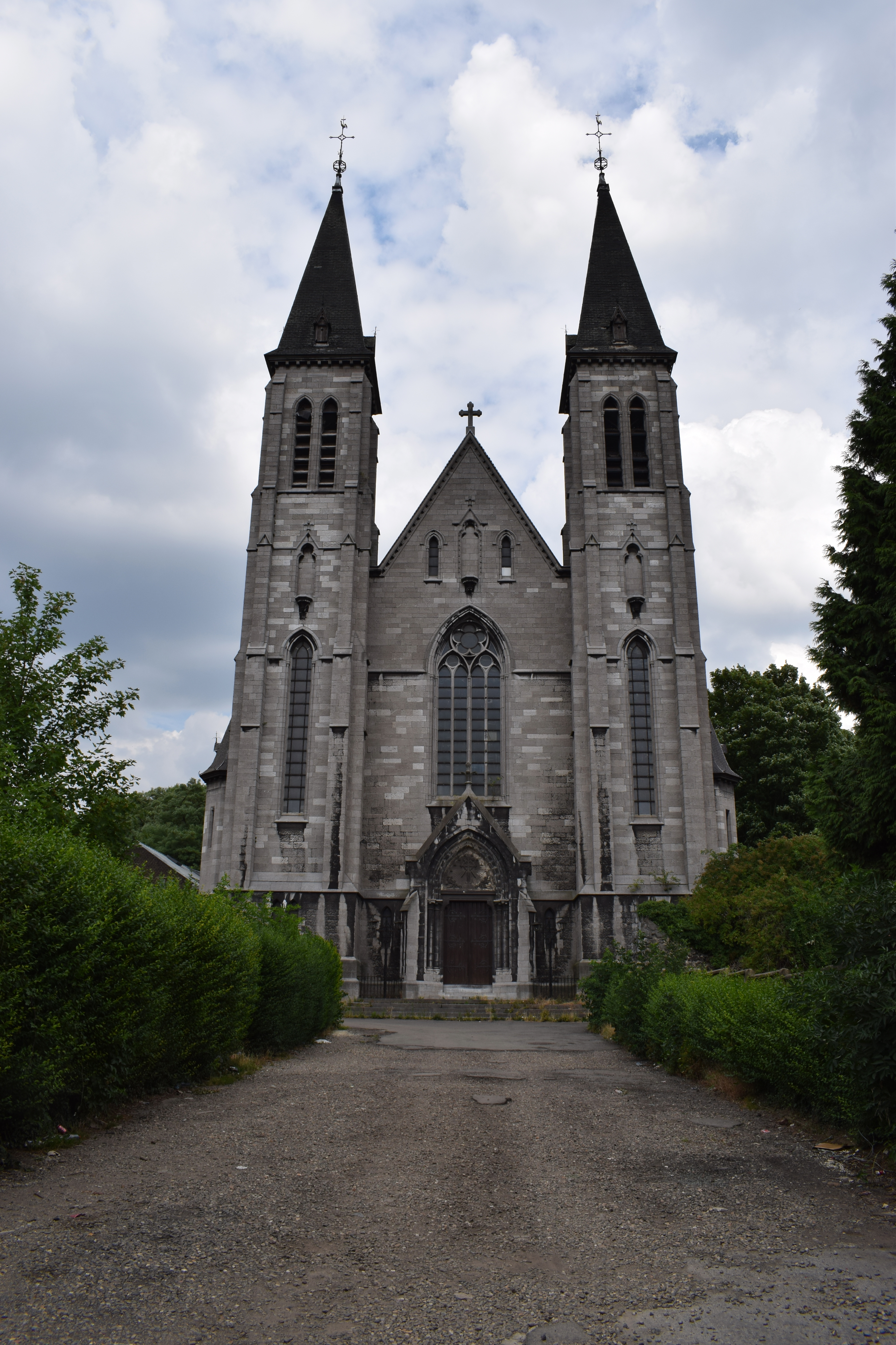 Vue des alentours de l'église Saint-Lambert (ancienne église du couvent des Missionnaires Oblats de Marie Immaculée) et du parc des Oblats à Grivegnée (quartier de la ville de Liège, en Belgique).